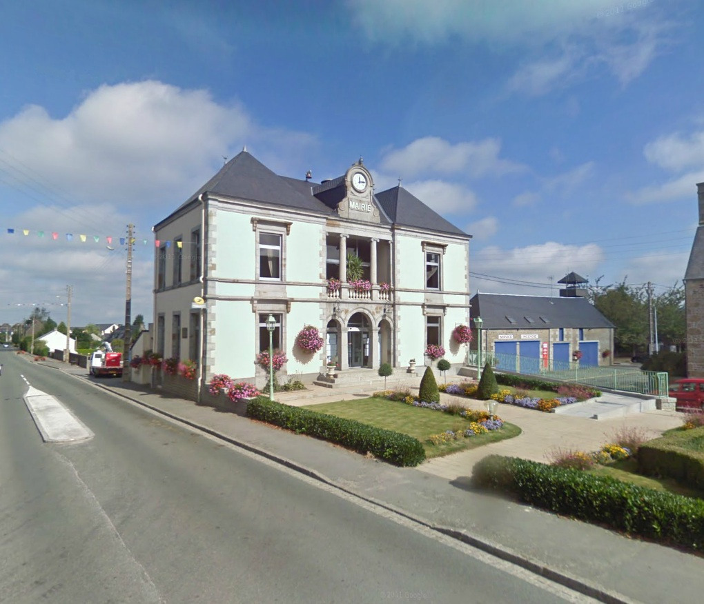 Mairie de Landivy, Mayenne.